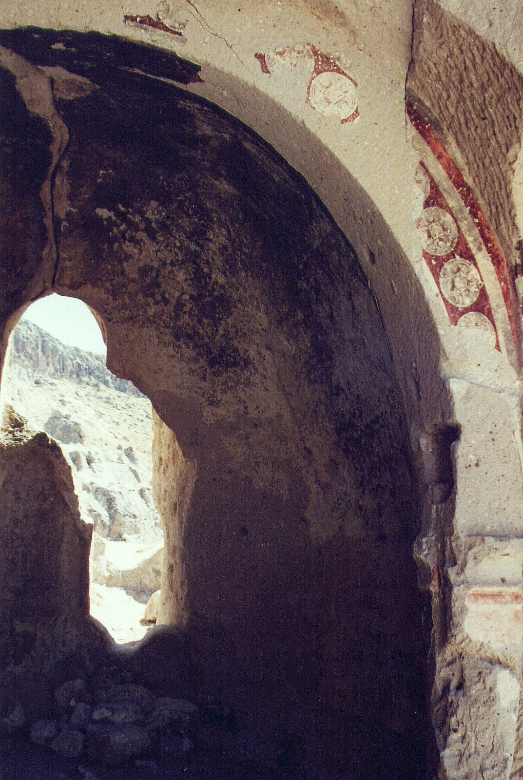 Malereireste nahe der Tokali Kilise im Soganli-Tal, Kappadokien, Zentraltürkei